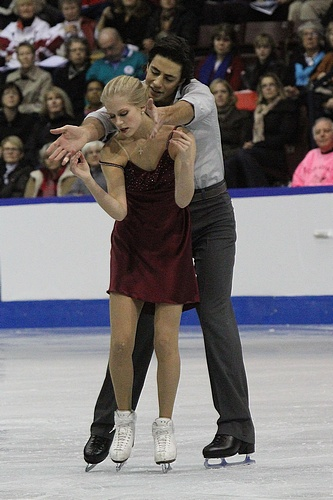 Кейтлин Уивер и Эндрю Поже на 2011 Skate Canada International